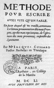 Catégorie:Écriture abrégée Première page du livre « Méthode pour escrire aussi vite qu'on parle » de Jacques Cossard. Image dans le domaine public (image scannée d'un livre qui date de 1651). On peut y lire le texte : METHODE POUR ESCRIRE AUSSI VITE QU'ON PARLE En suite duquel est un traité contenant La bonne prononciation des mots Fran- çais et des mots équivoques, de l'écri- ture des mots prononcez, ensemble des synonimes. Par M? Jacques Cossard Prêtre Bachelier en Théologie A Paris Chez l'Autheur, au collège de la Marche M DC LI Avec privilège du Roy Traduction en français moderne : « M DC LI » est l'année 1651 « Roy » : le roi, ici Louis XIV